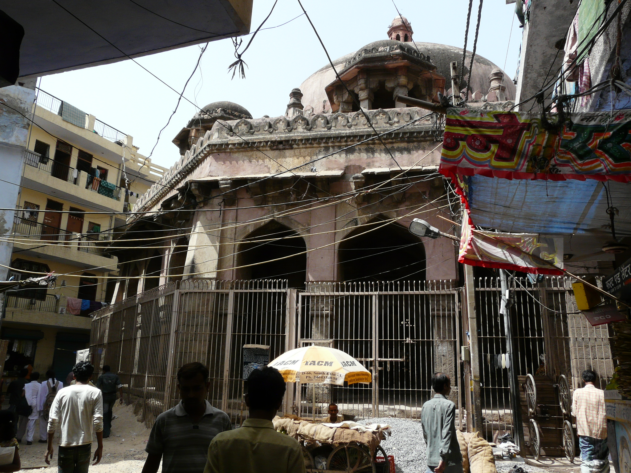 Mubarak Shah's tomb